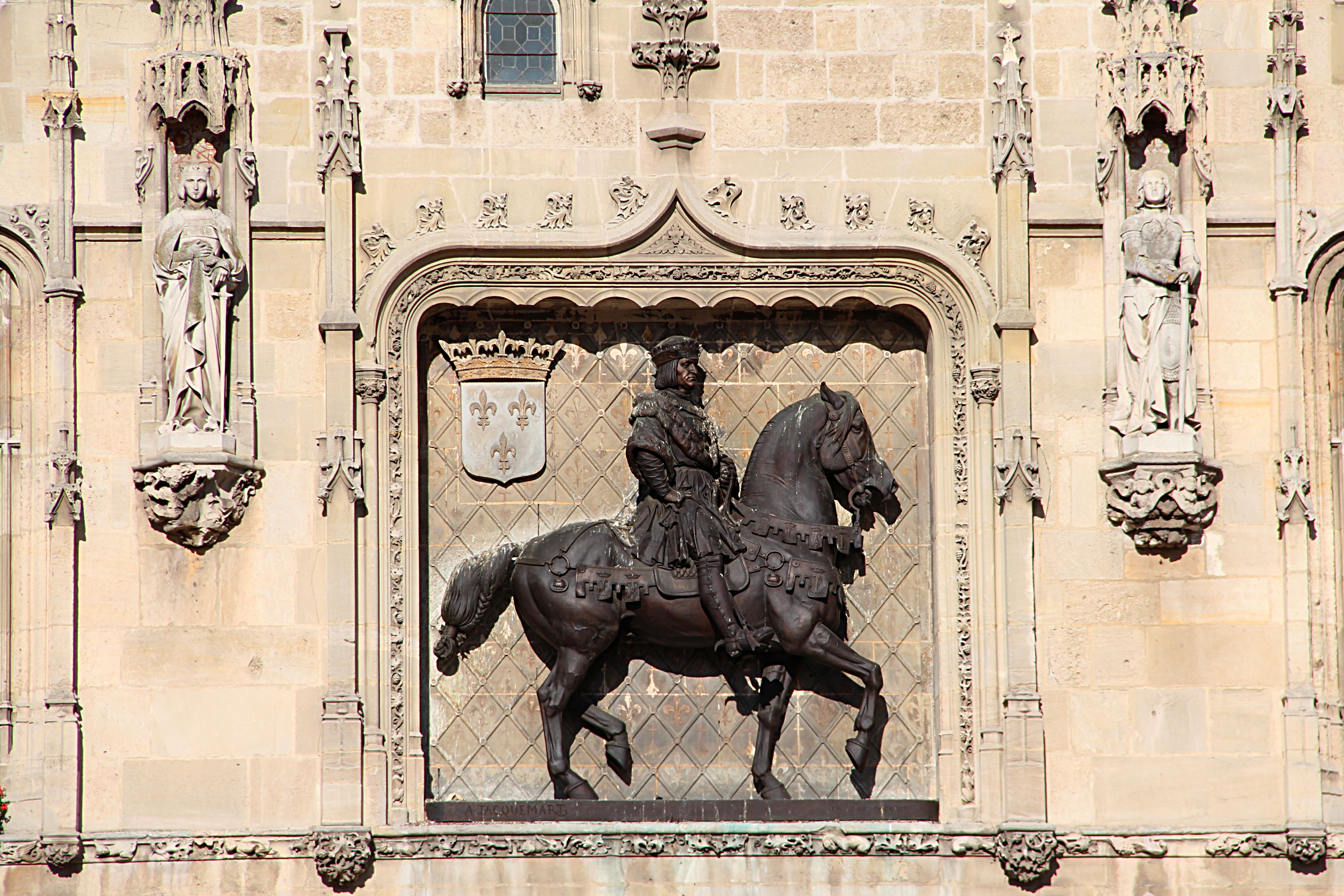 Statue équestre de Louis XII, sur la façade de l'hôtel de Ville de Compiègne (Oise, France).